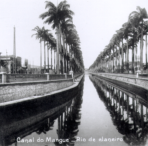 Conde de Agrolongo. "Canal do Mangue, Rio de Janeiro" RJ , ca. 1908 estereoscopia Coleção Fichel David Chargel